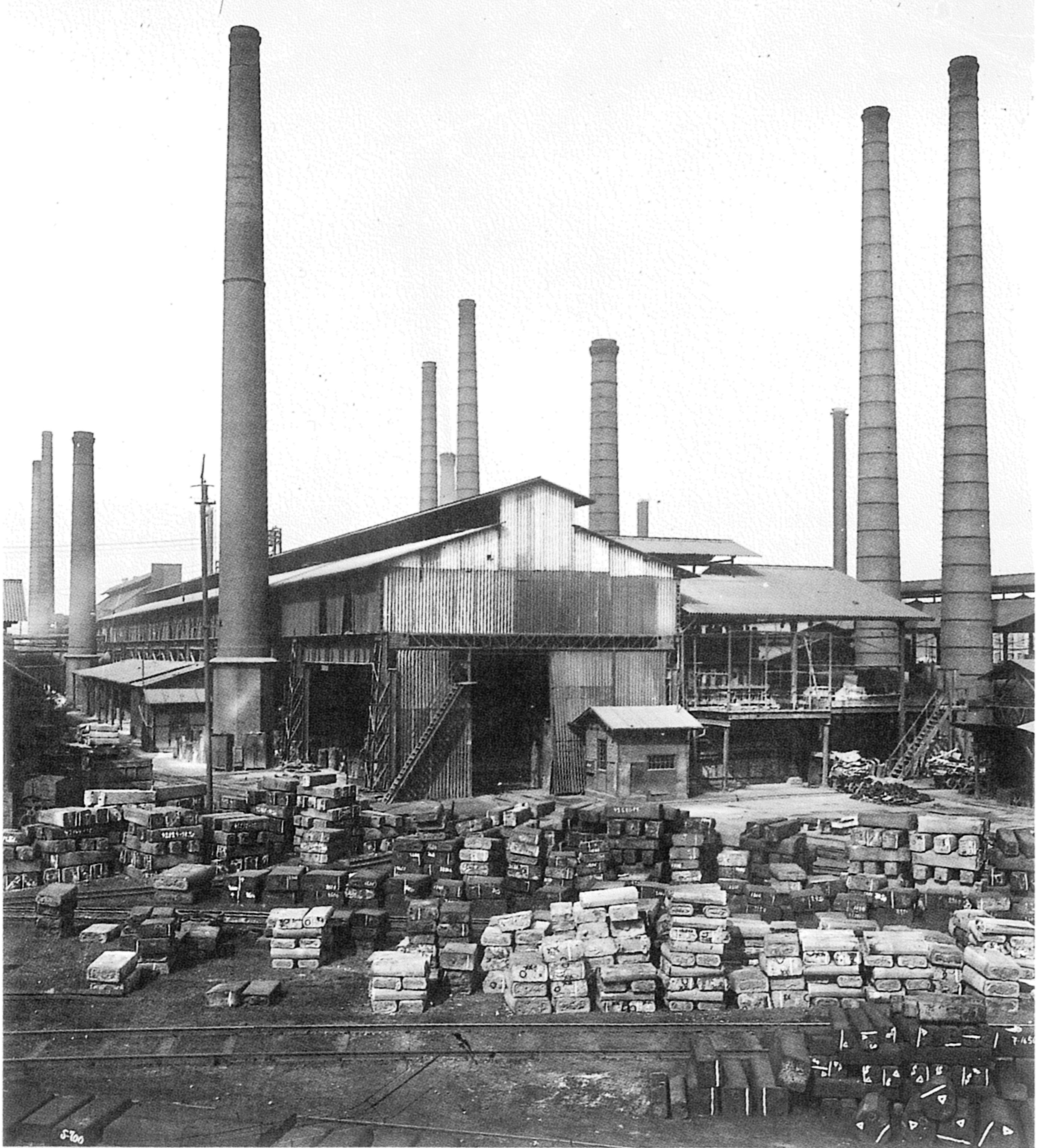 Siemens Martin Werk der Dillinger Hütte